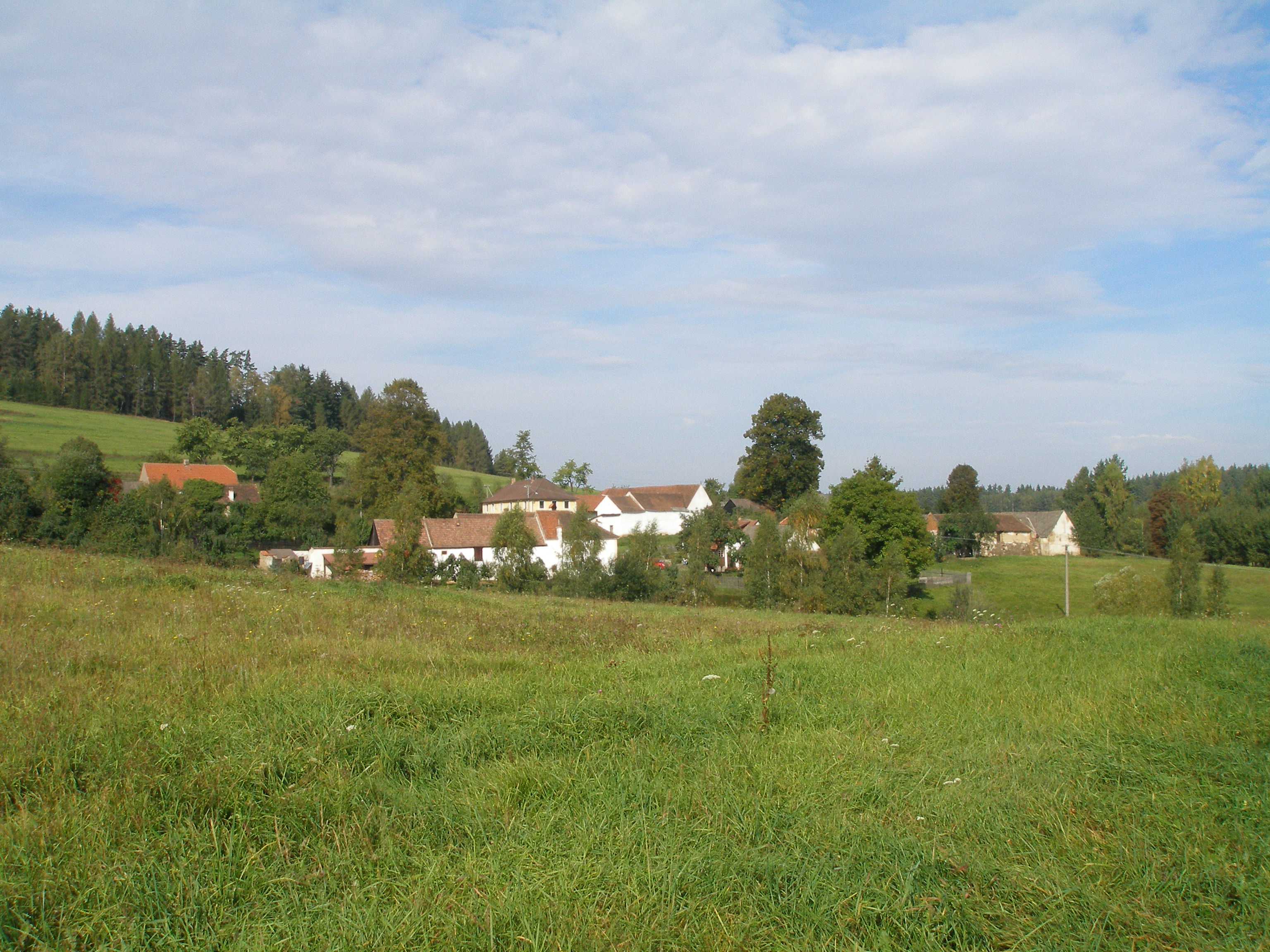 Sedlice (u Přídolí), celkový pohled